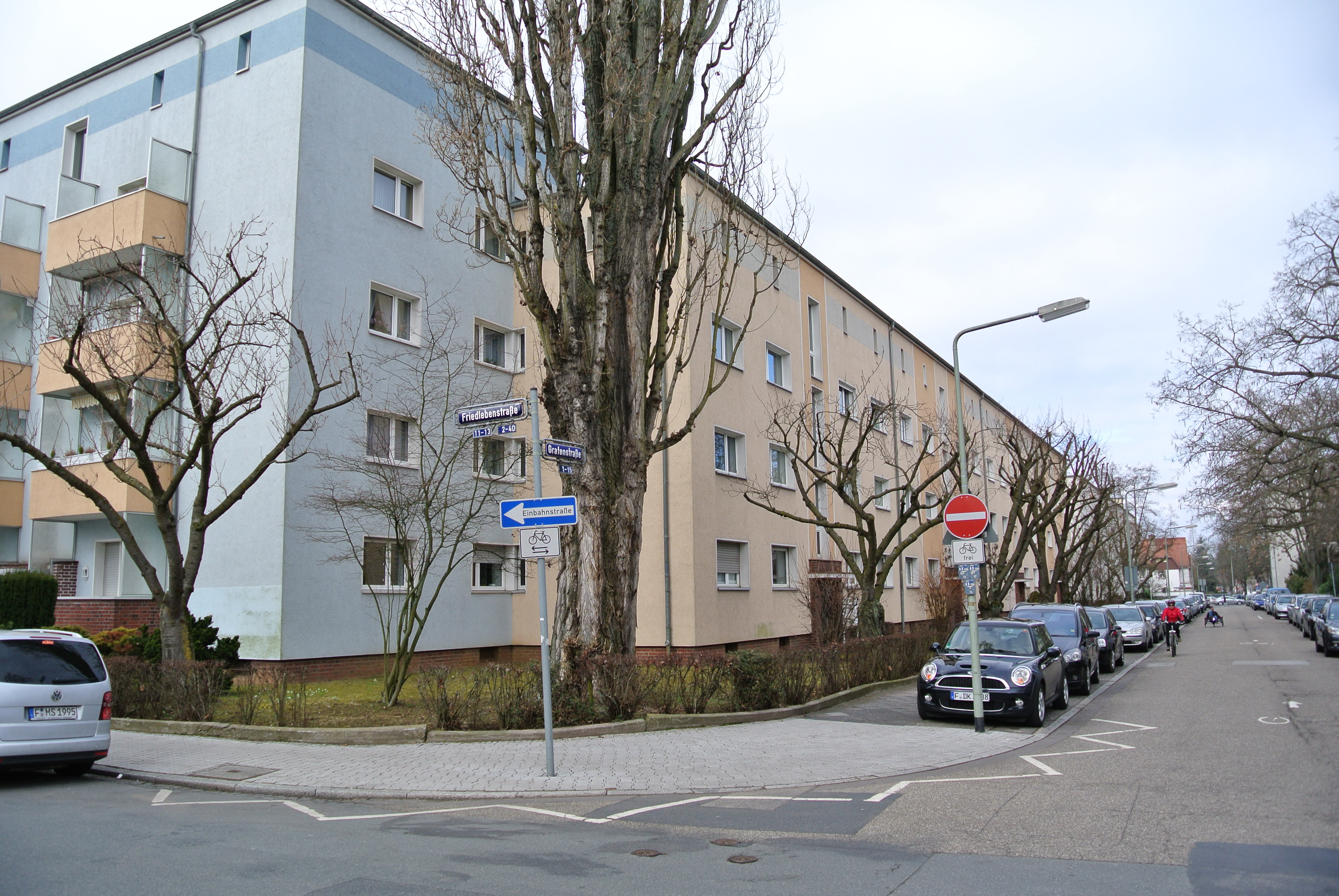 Grafenstraße Ecke Friedlebenstraße